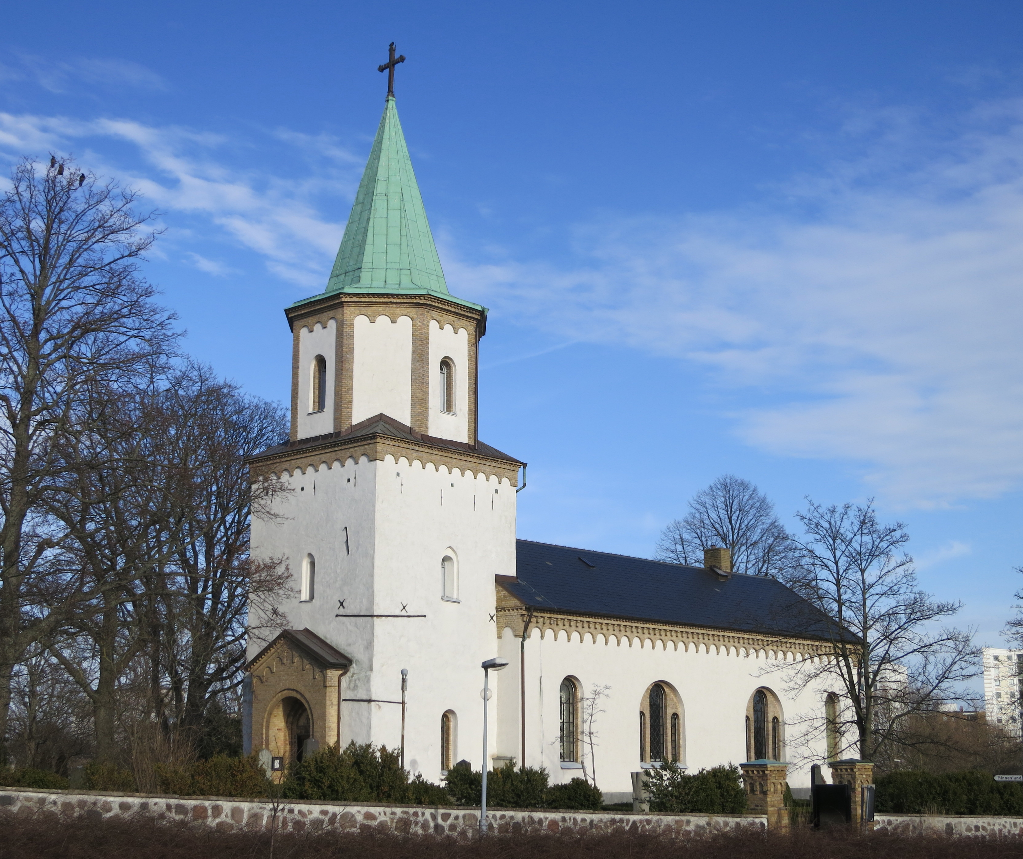 Västra Skrävlinge kyrka, mars 2014